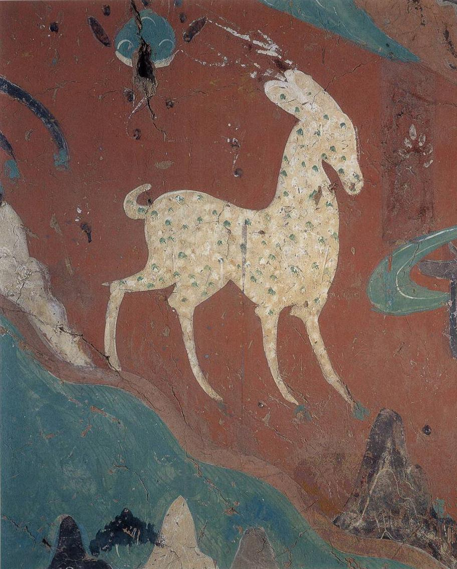 九色鹿壁画局部，敦煌莫高窟257窟。